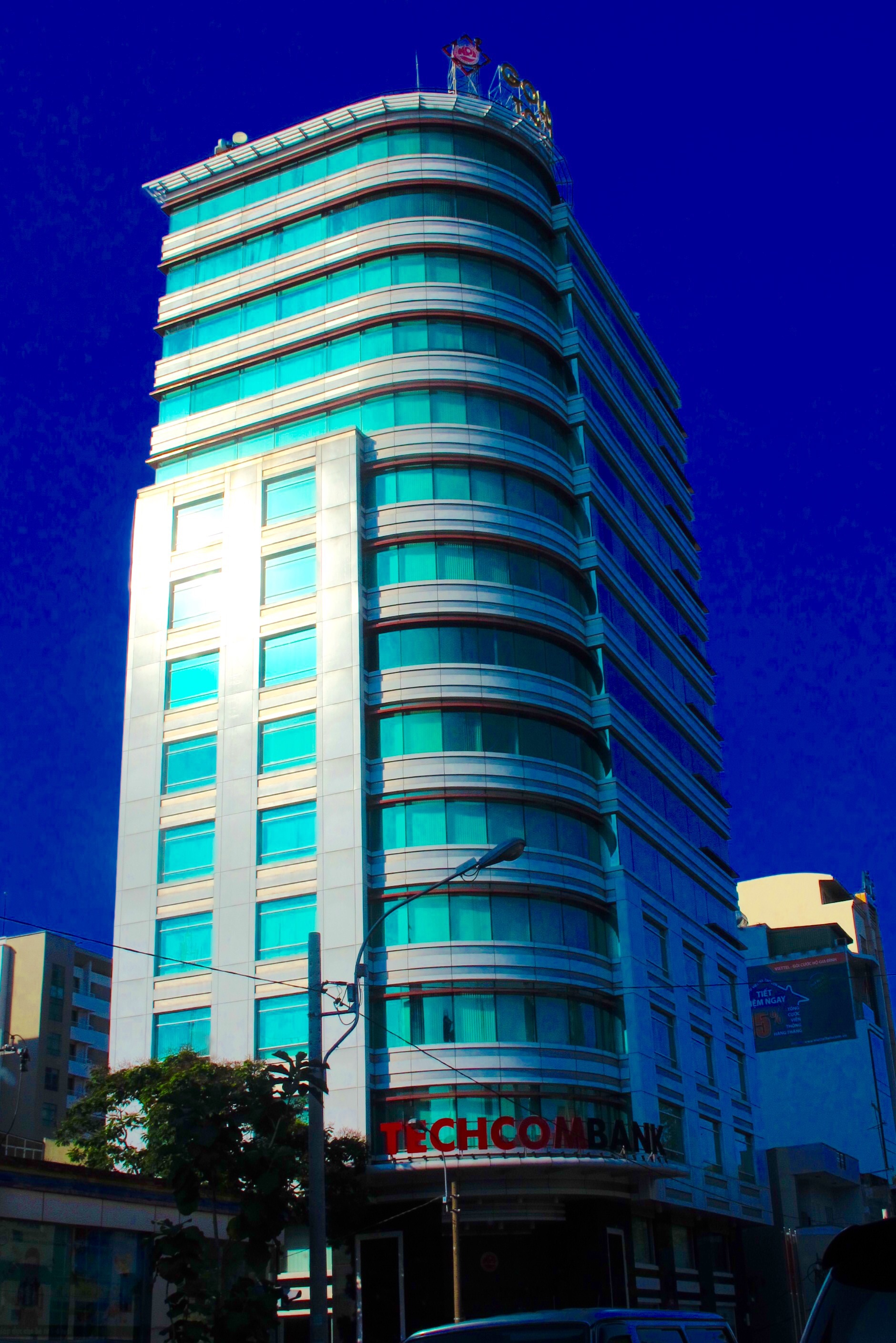 Ngan hang Tehcombank, nguyen thi minh khai , q1 saigon